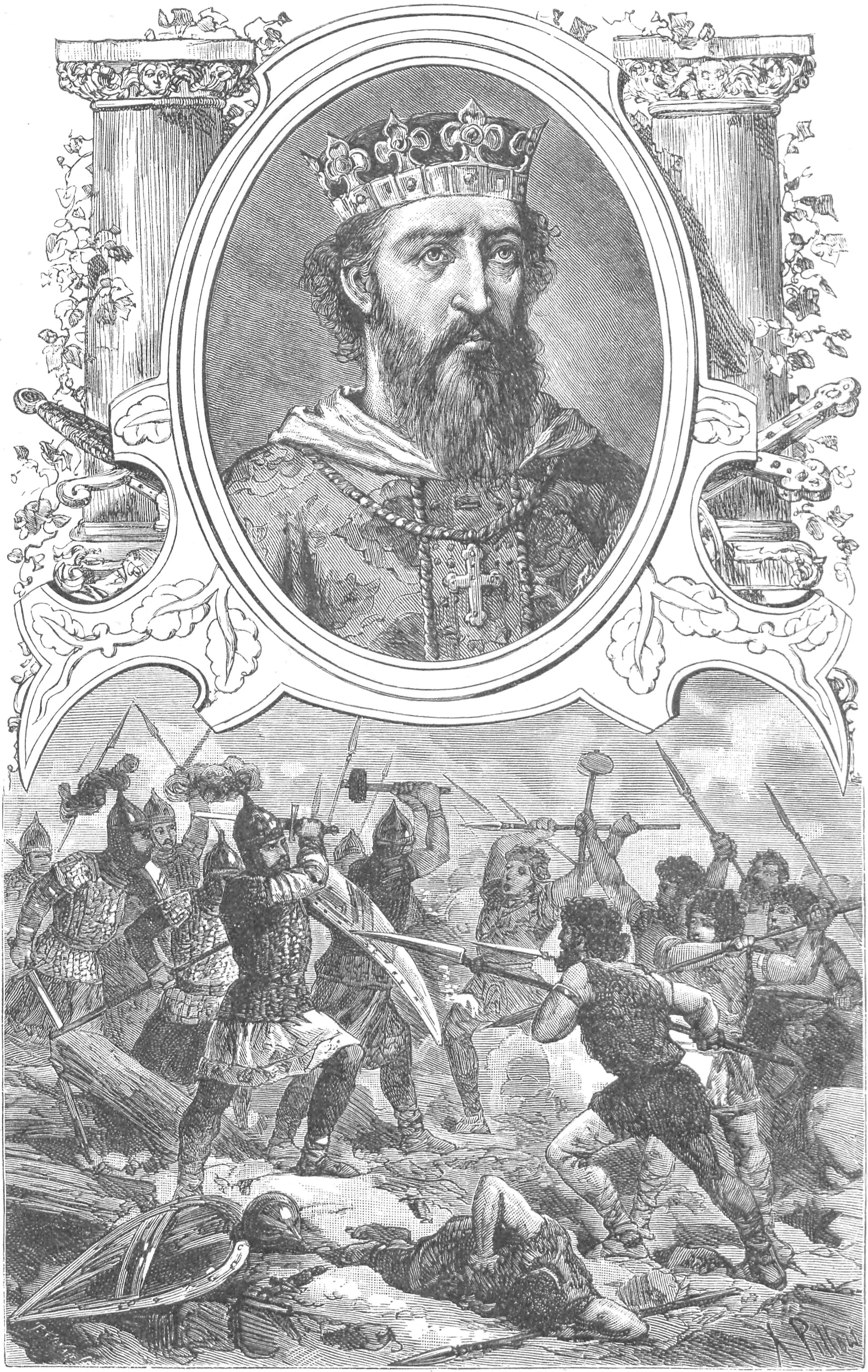 ilustracja z książki „Wizerunki książąt i królów polskich“